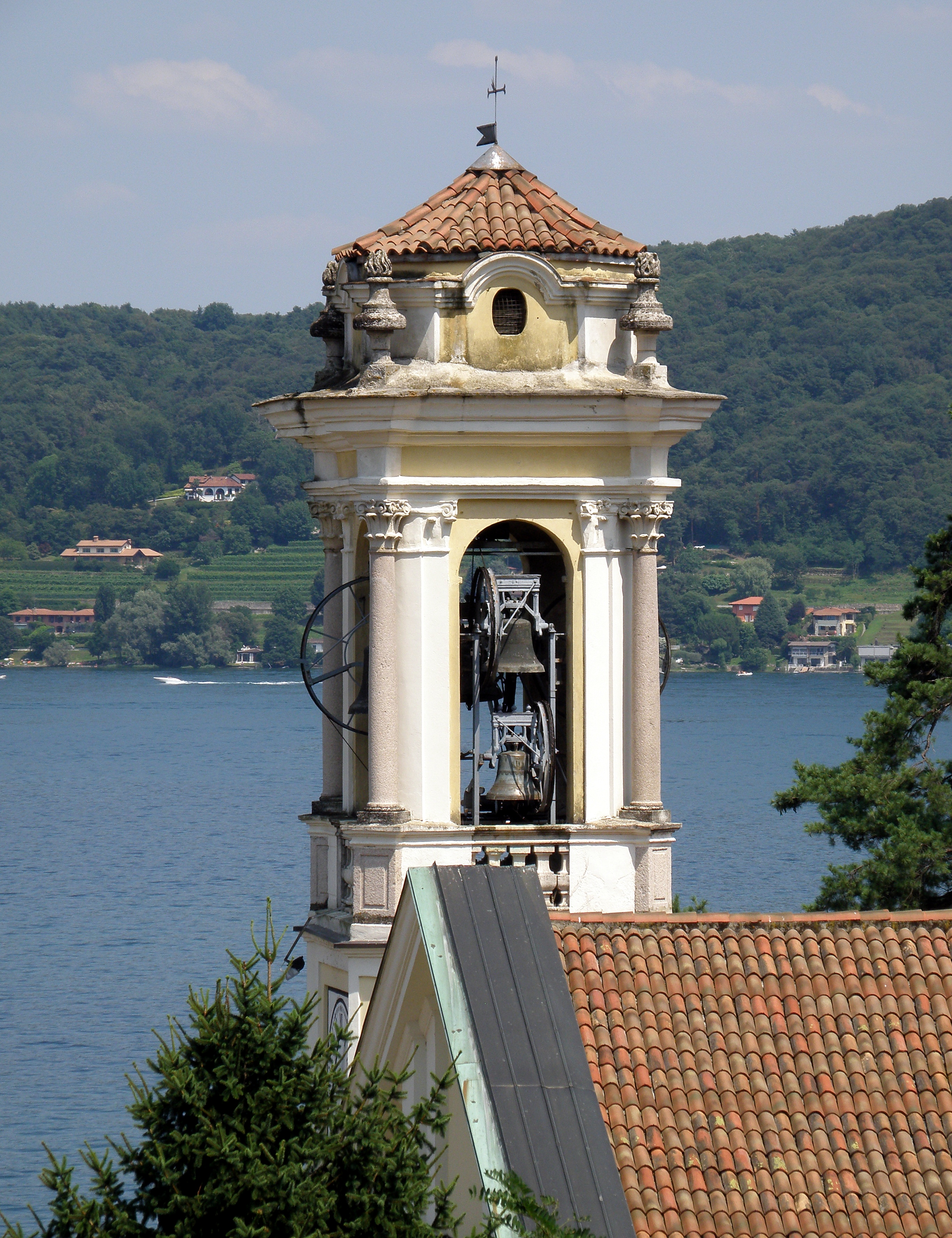 Meina (NO). Chiesa parrocchiale di Santa Margherita (consacrata nel 1785).